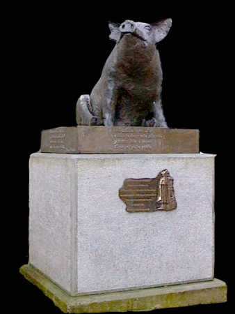 Monumento al gochu en el concejo de Noreña.